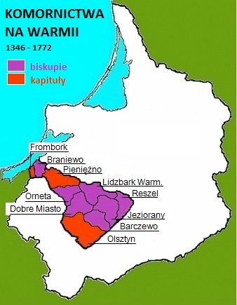 Podział Warmii na komornictwa biskupie i kapitulne